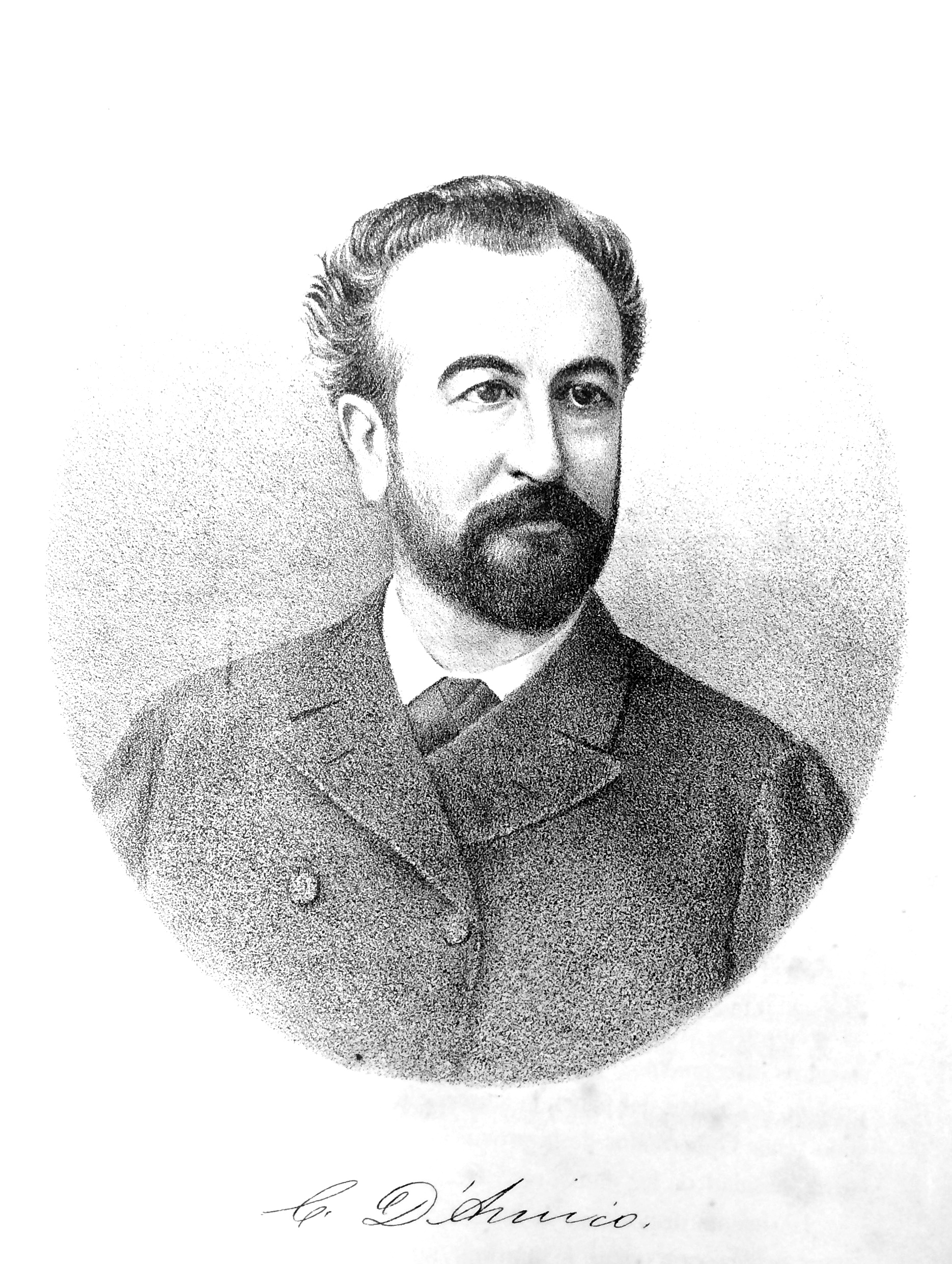 Carlos A. D'Amico en 1884.